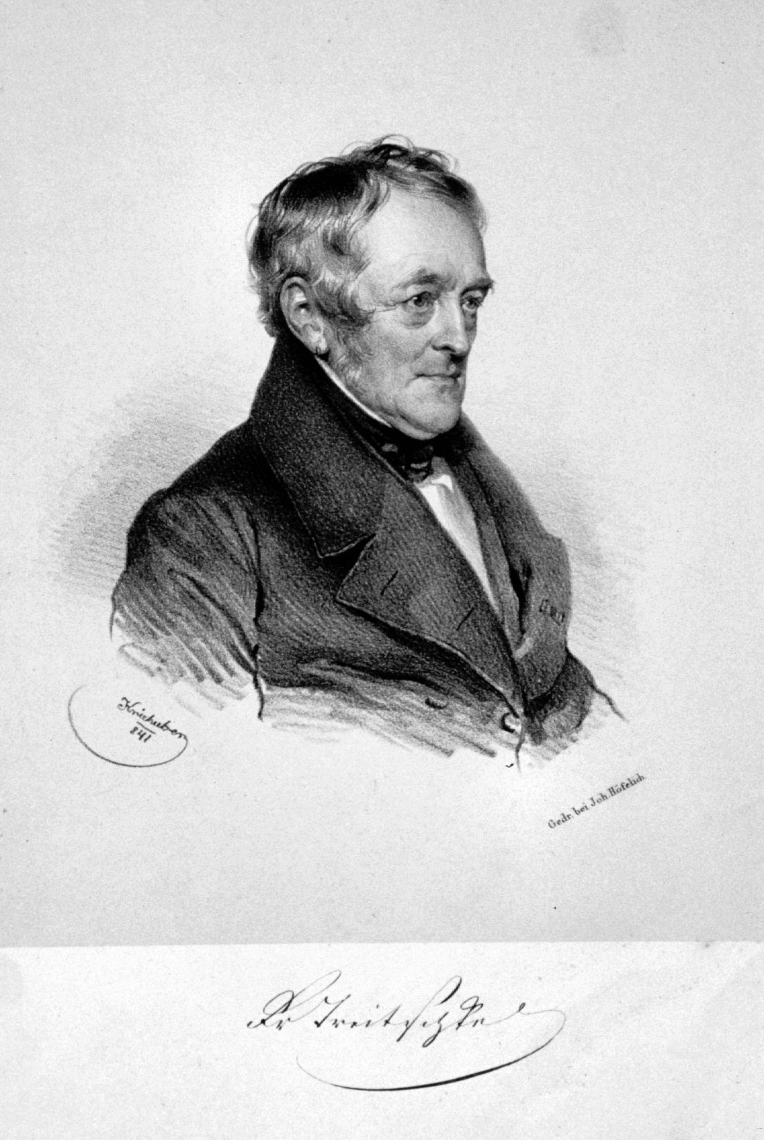 Georg Friedrich Treitschke (17776-1842), deutsch-österreichischer Schriftsteller, Librettist und Entomologe.